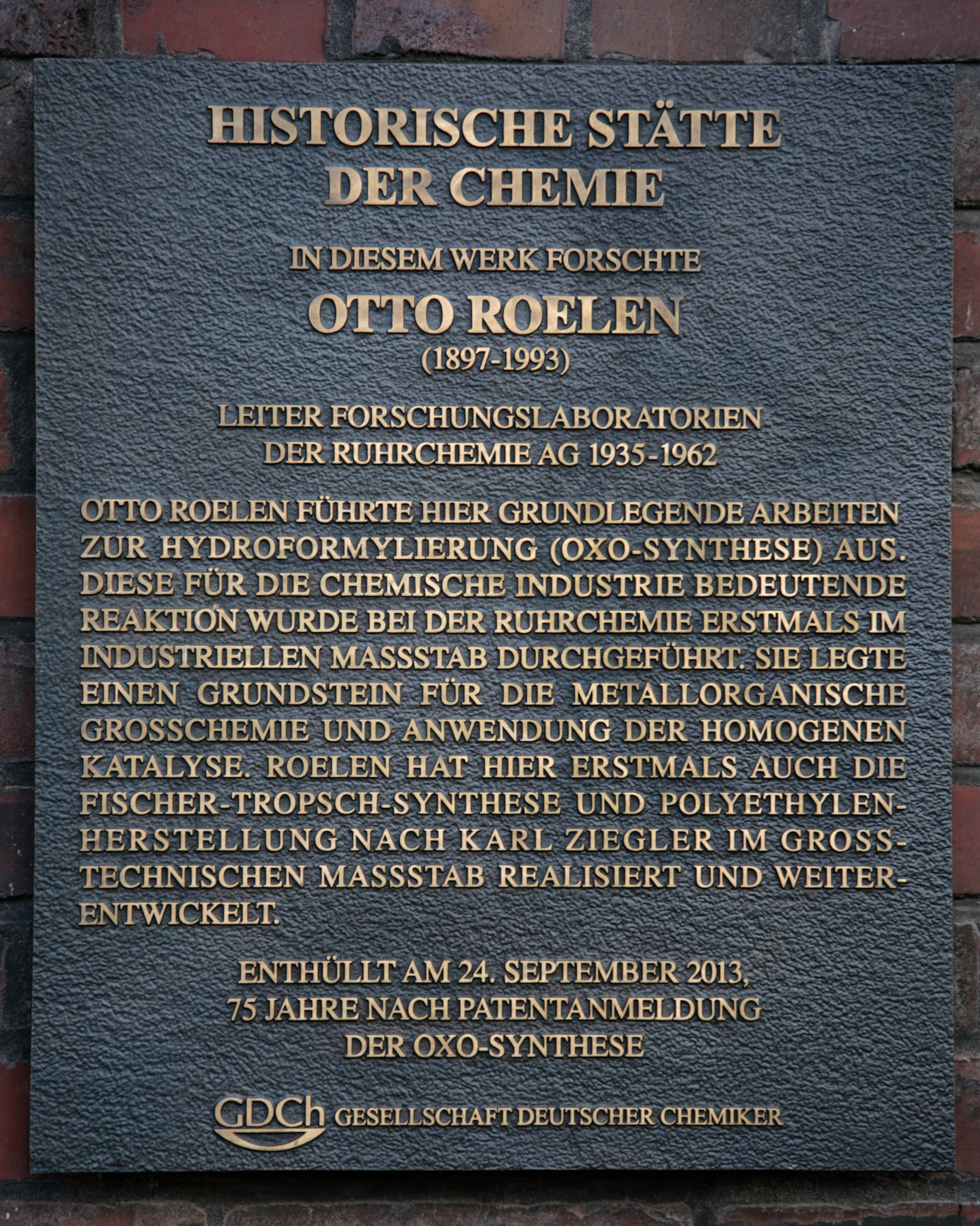 Gedenktafel "Historische Stätten der Chemie" der GDCh zu Ehren Otto Roelens am Oxea Werk Ruhrchemie, Oberhausen